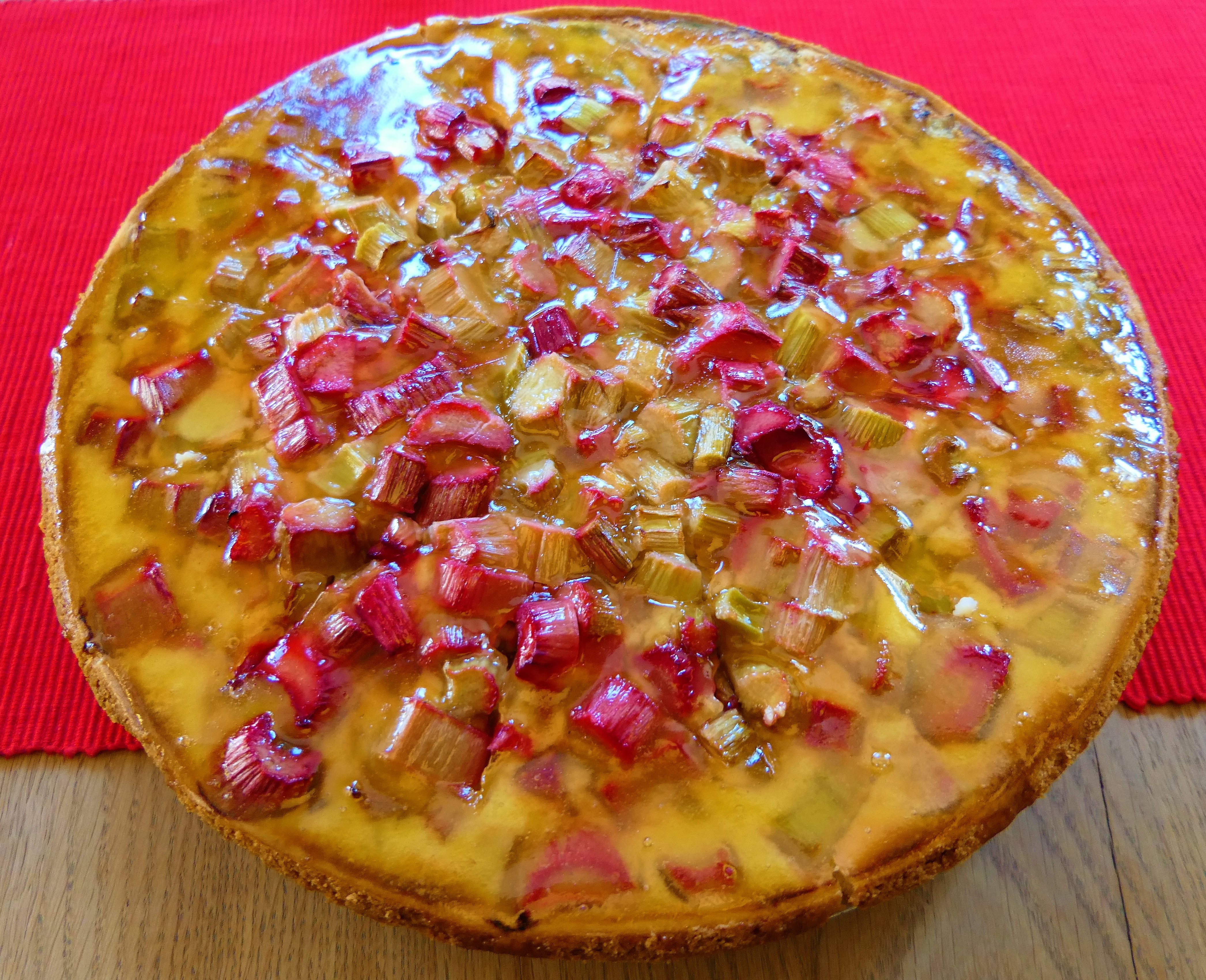 Rhabarberkuchen in der Region Stuttgart, Bäckerei Stuber in Fellbach